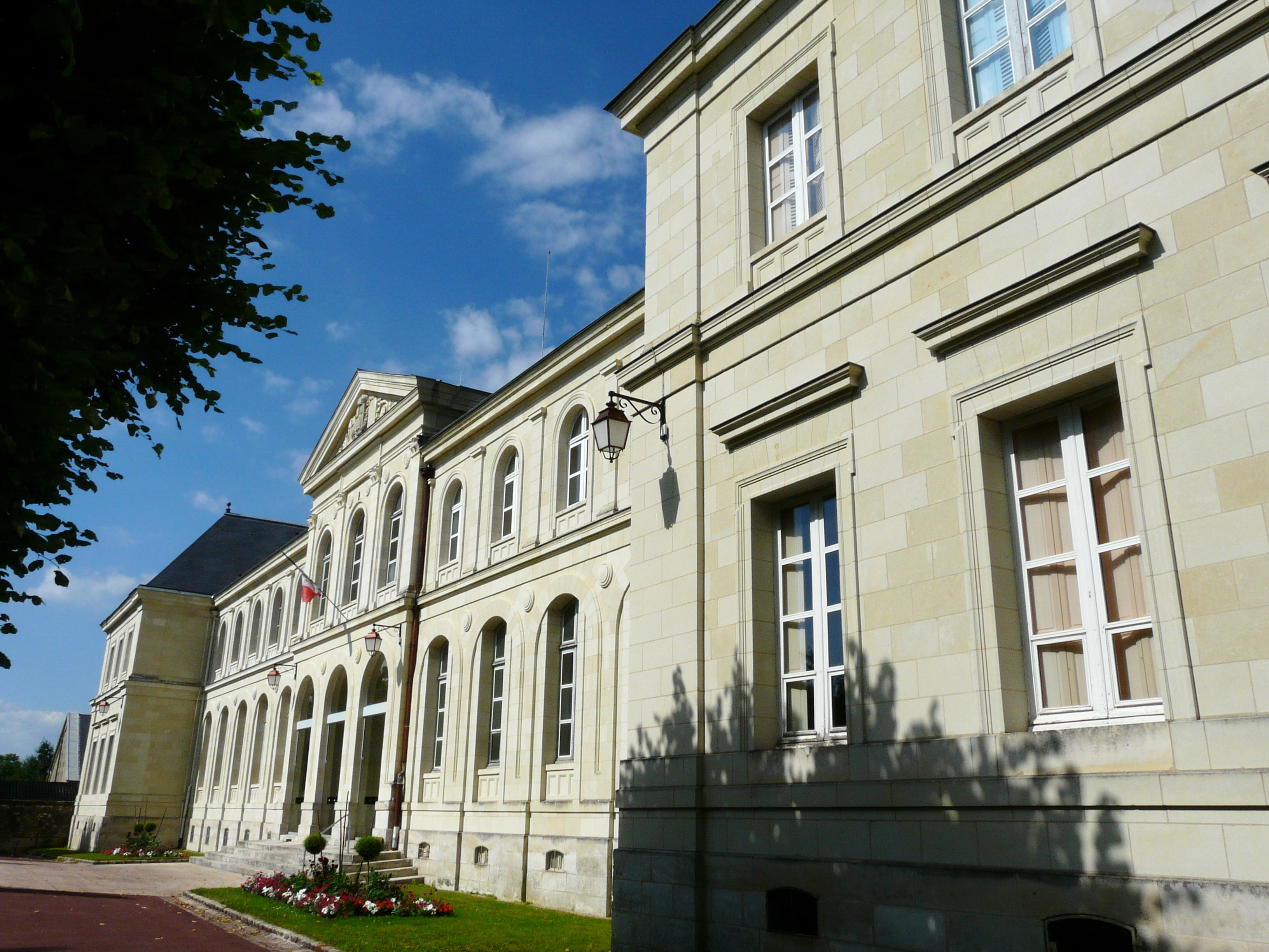 L'hôtel de ville de Loudun, Vienne, France